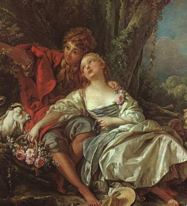 Boucher:Pastorale